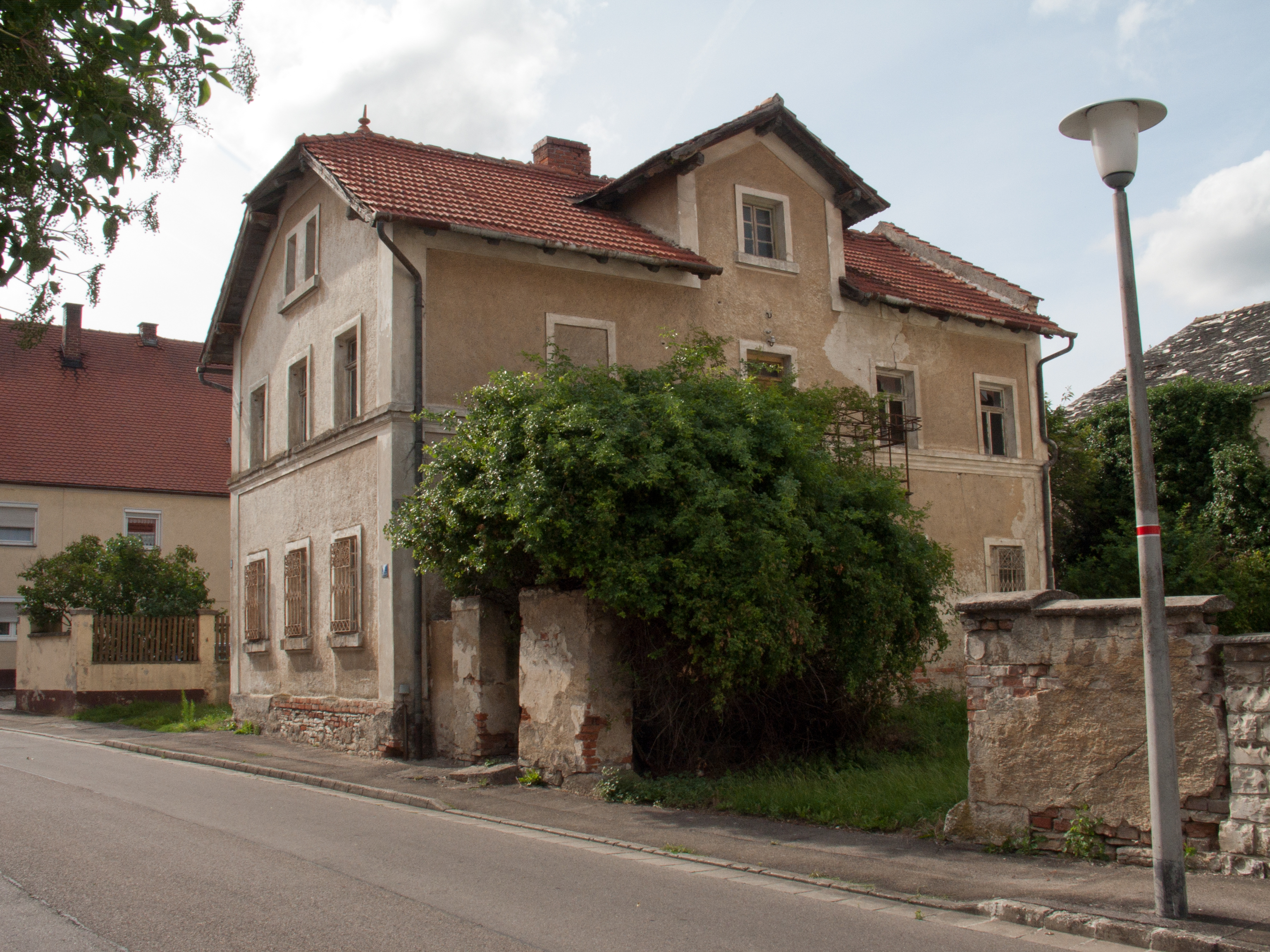 Buxheim (Oberbayern), Haus Hopfenstr. 6.